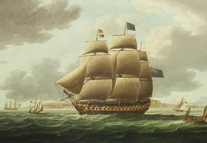 The Ship Ville de Paris under Full Sail